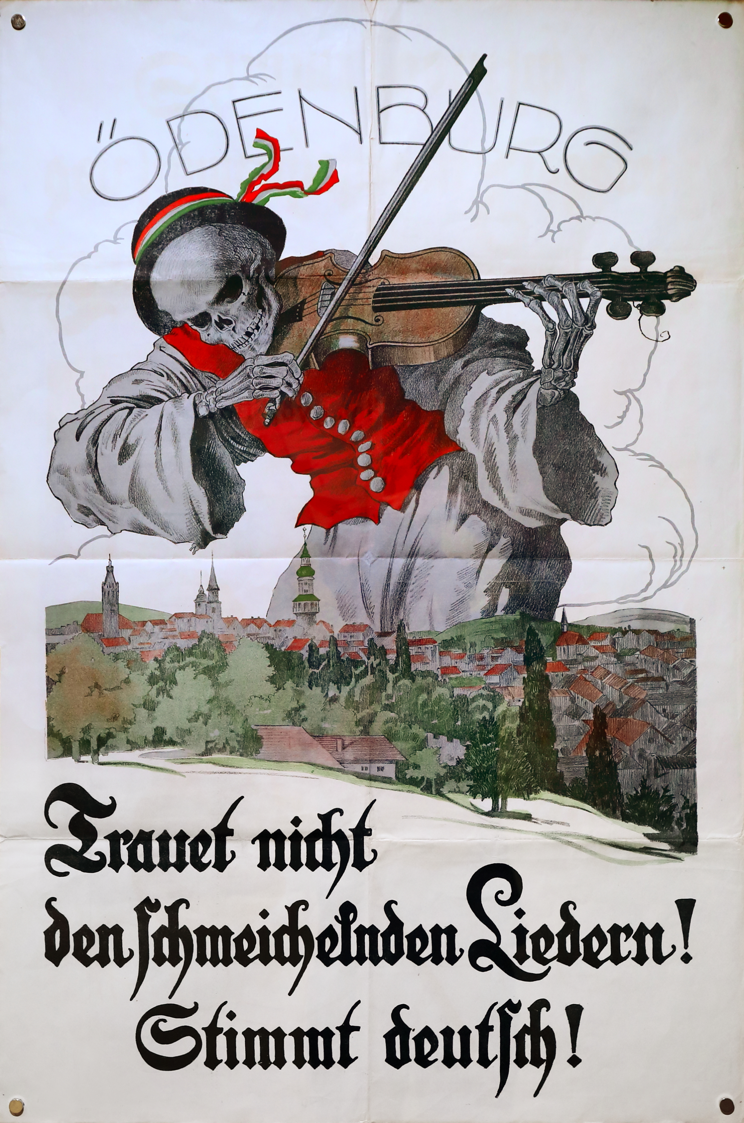 hu: sopronplebiszit de: Volksabstimmung 1921, Text: "Trautet nicht den schmeichelnden Liedern! Stimmt deutsch!"